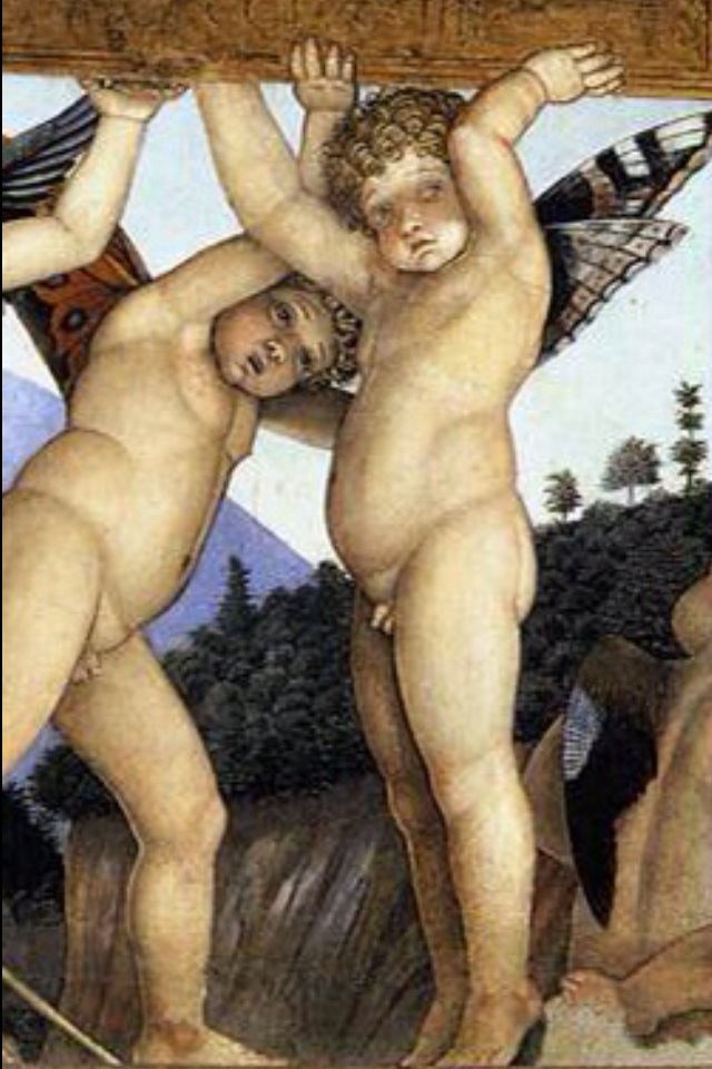 Hecho por Andrea Mantegna